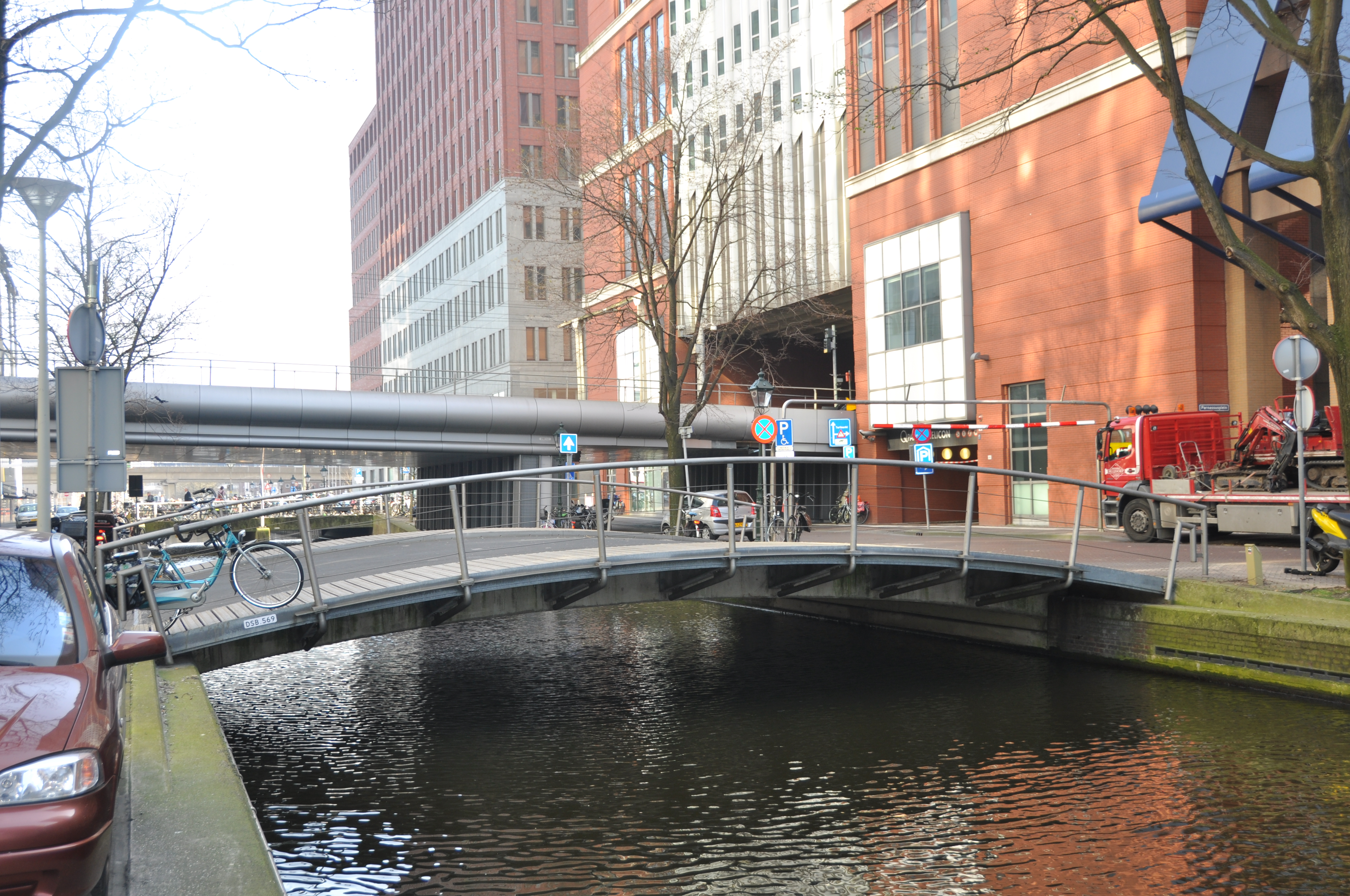 The Hague Bridge DSB 569 - MinOCW.